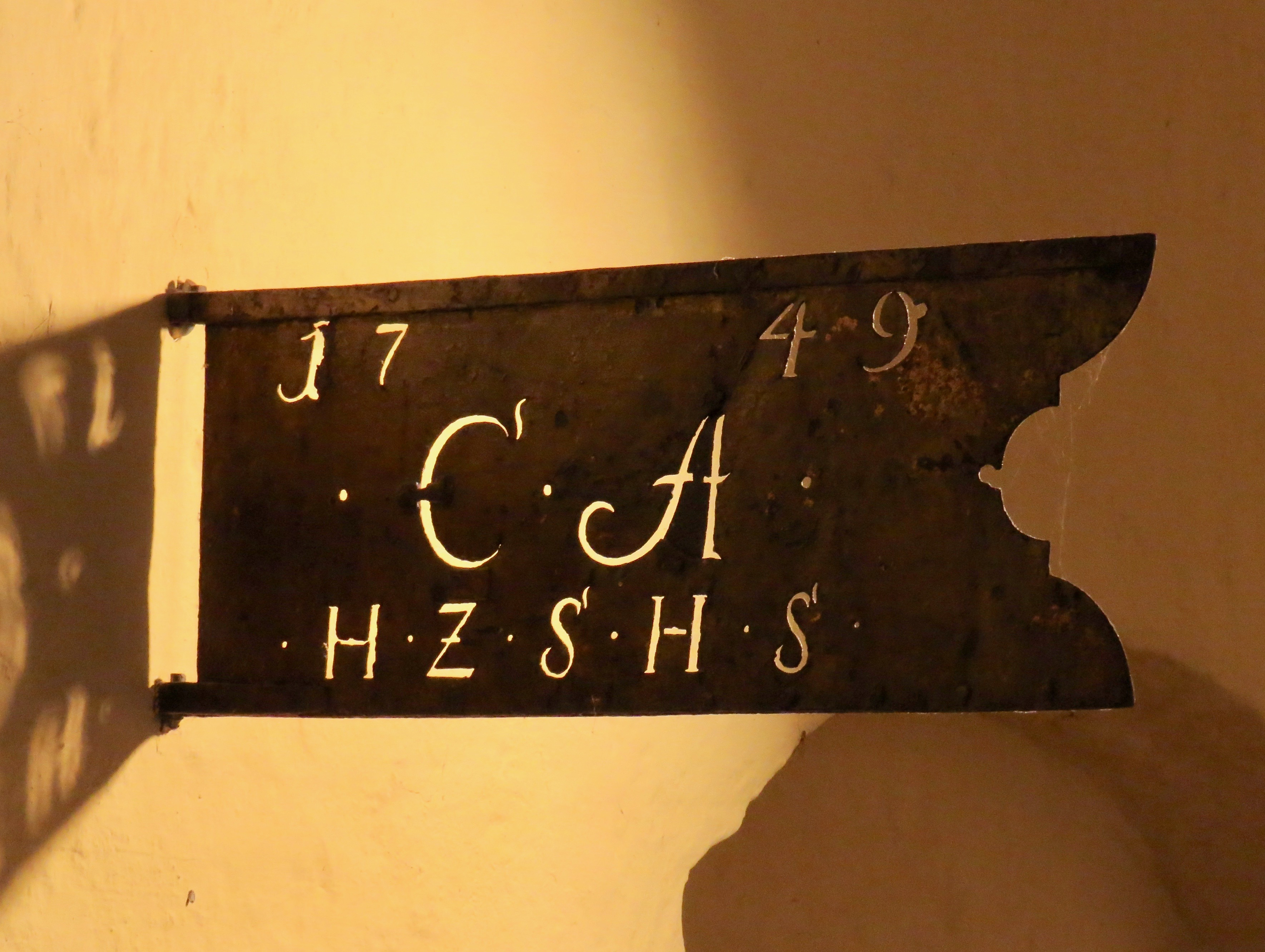 Vindfløj fra Gråsten: 1749 C[hristian] A[ugust] H[erzog] Z[u] S[chleswig] H[olstein] S[onderburg]. I Augustenborg Minimuseum